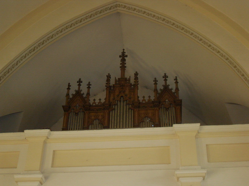 Трабы. Касцёл Раства Дзевы Марыі